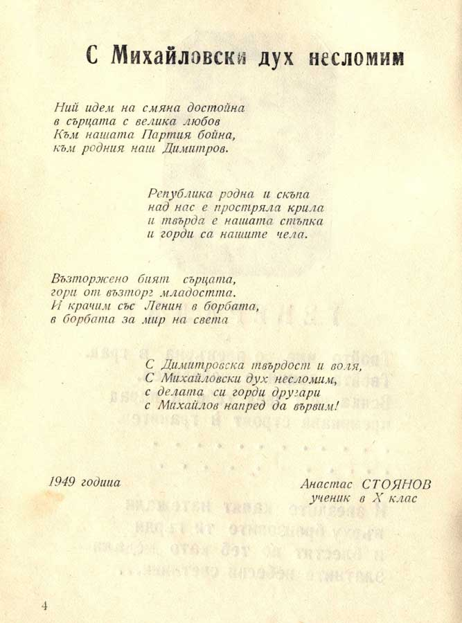 Химн на гимназия "Христо Михайлов", Михайловград